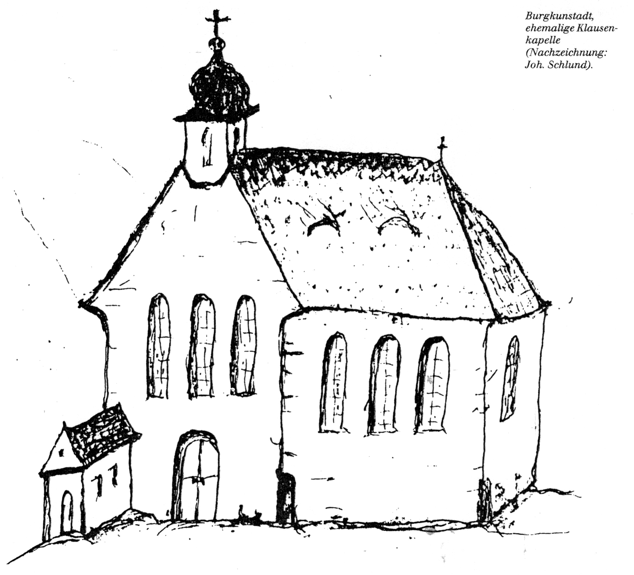 Skizze der Burgkunstadter Klausenkapelle, gezeichnet von Johannes Schlund